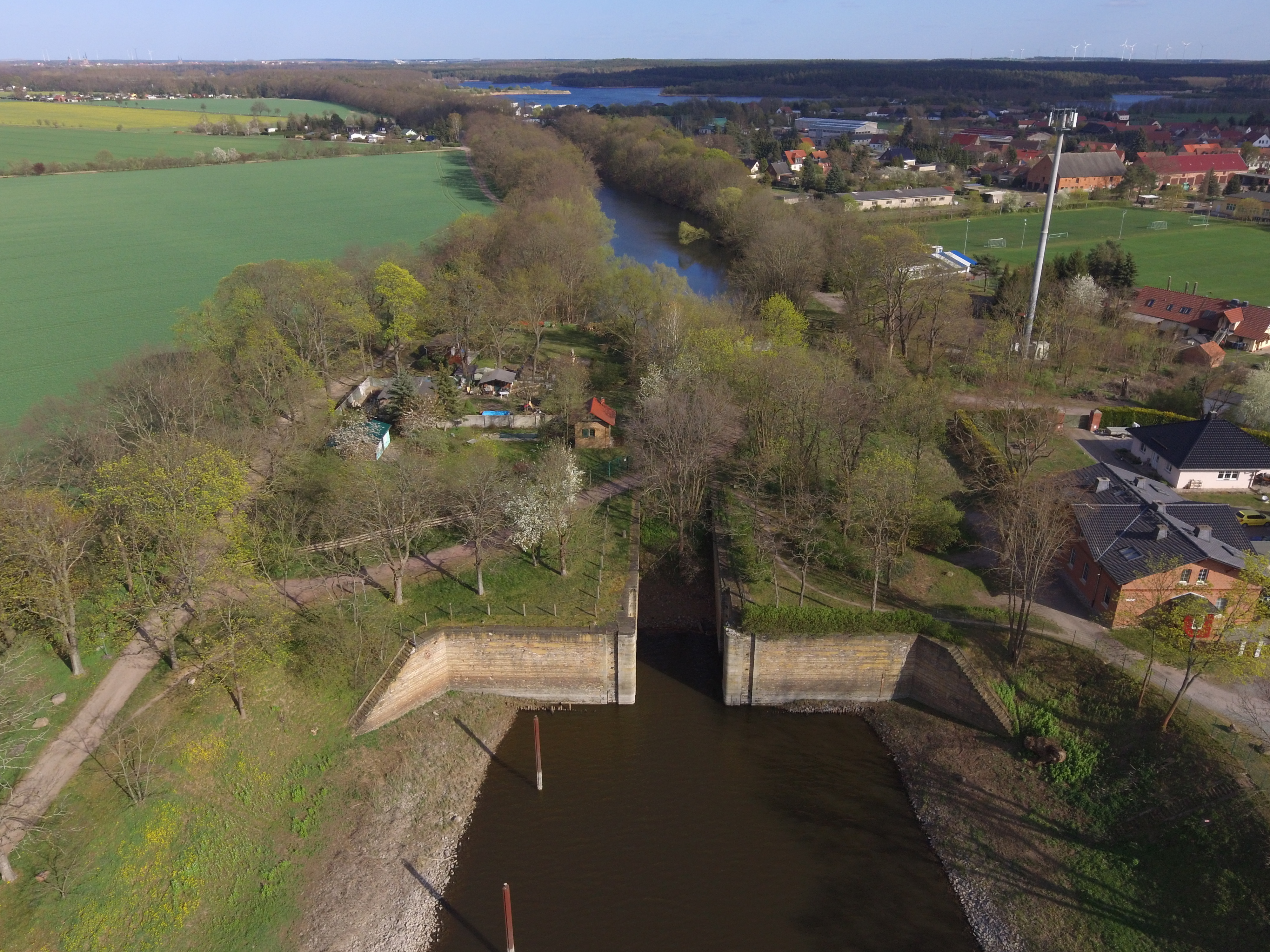 Alte Schleuse Niegripp im Luftbild